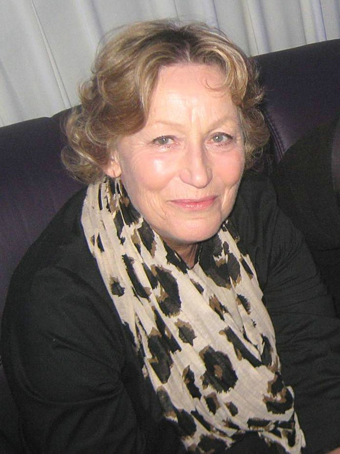 Budzisz-Krzyżanowska Teresa, aktorka.